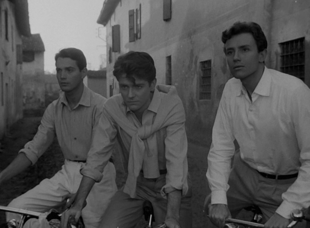 Screenshot del film Gli sbandati (1955) di Francesco Maselli.